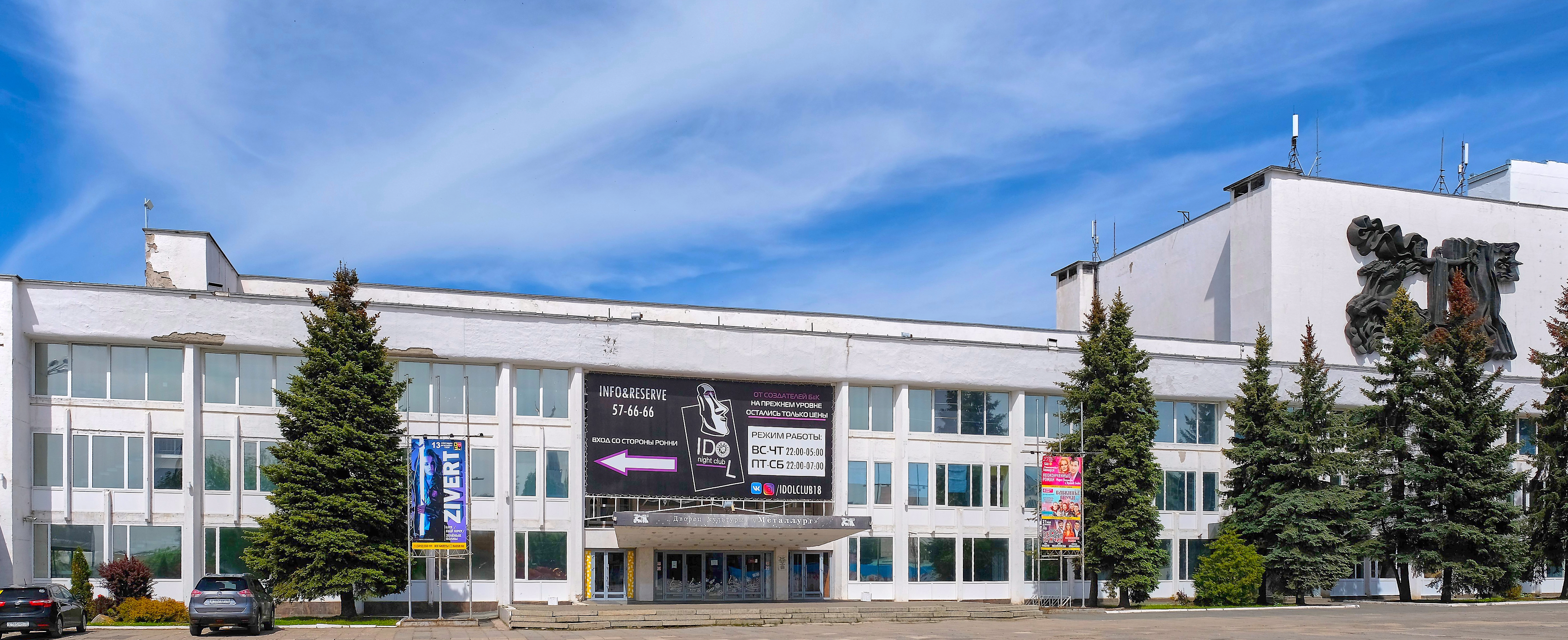 ДК Металлургов в Ижевске